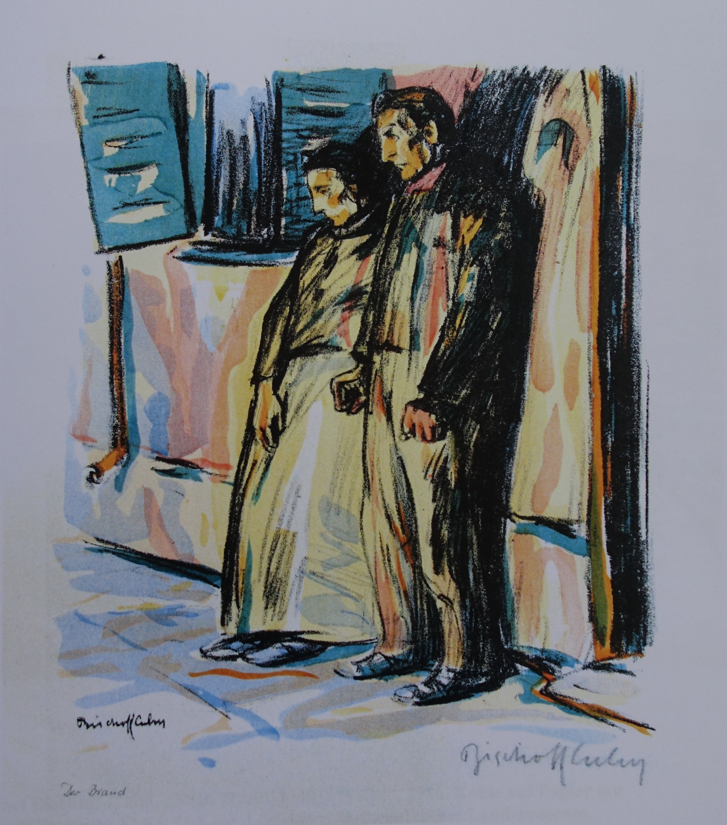 Gemälde